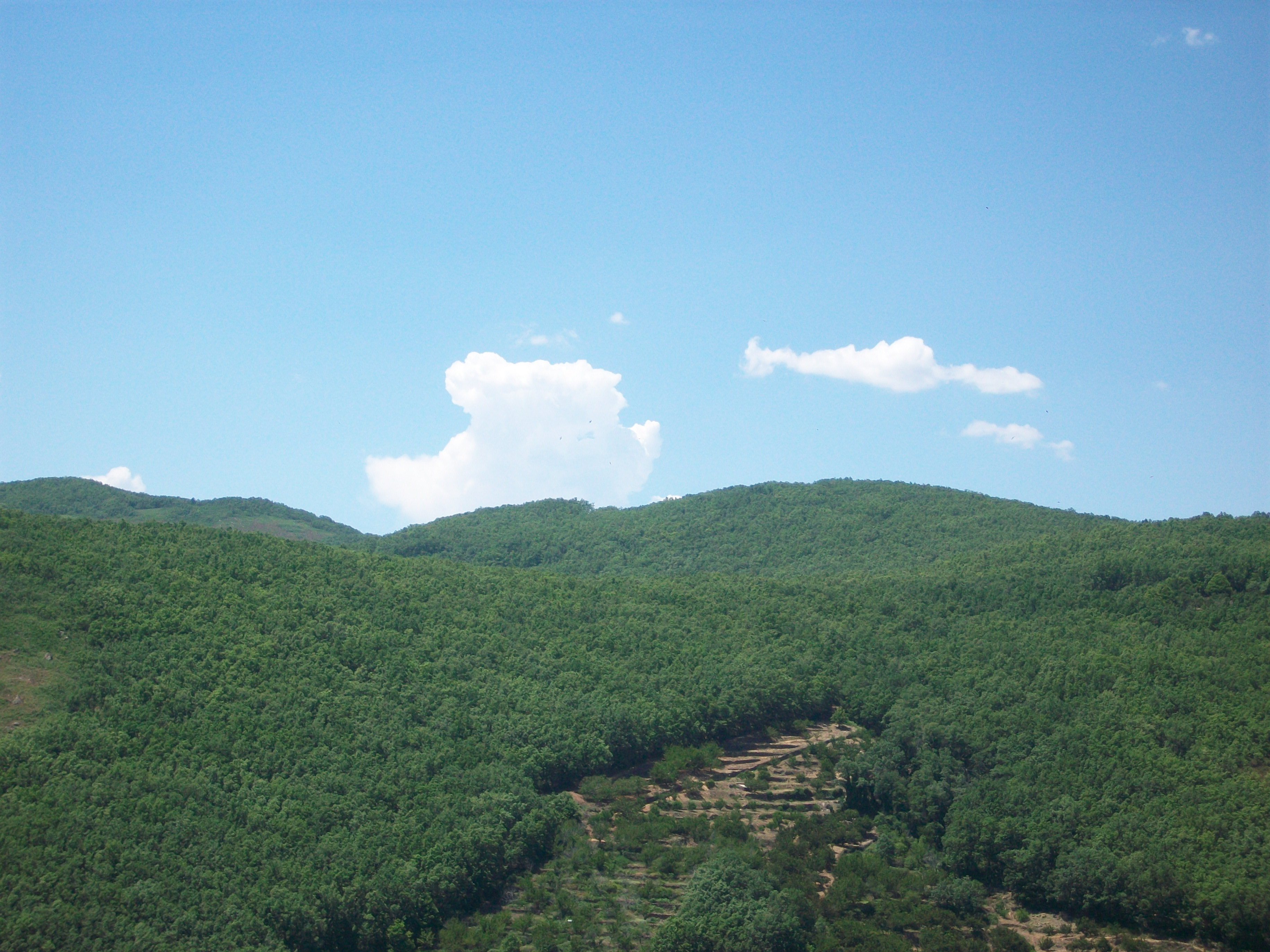 Vista de la Sierra desde la población de Barrado